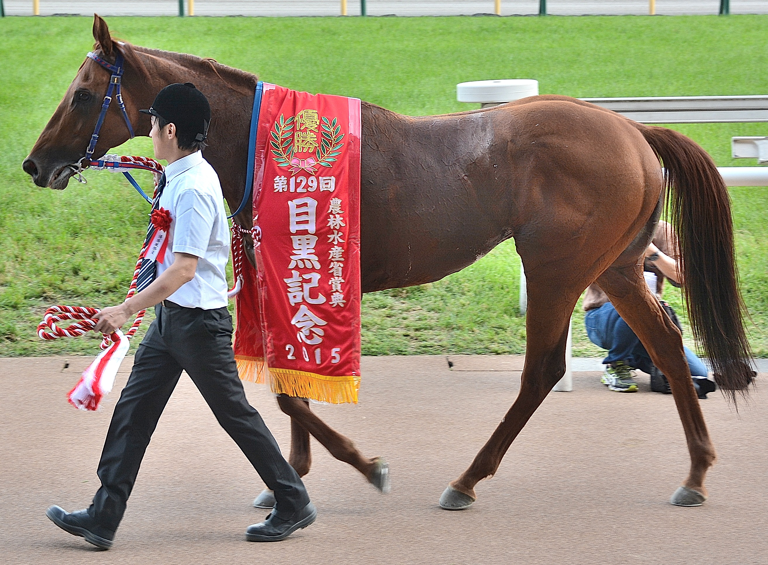 2015年5月31日に東京競馬場で行われた第129回目黒記念で、優勝レイを着装した勝利馬ヒットザターゲットを観客席から撮影したもの。